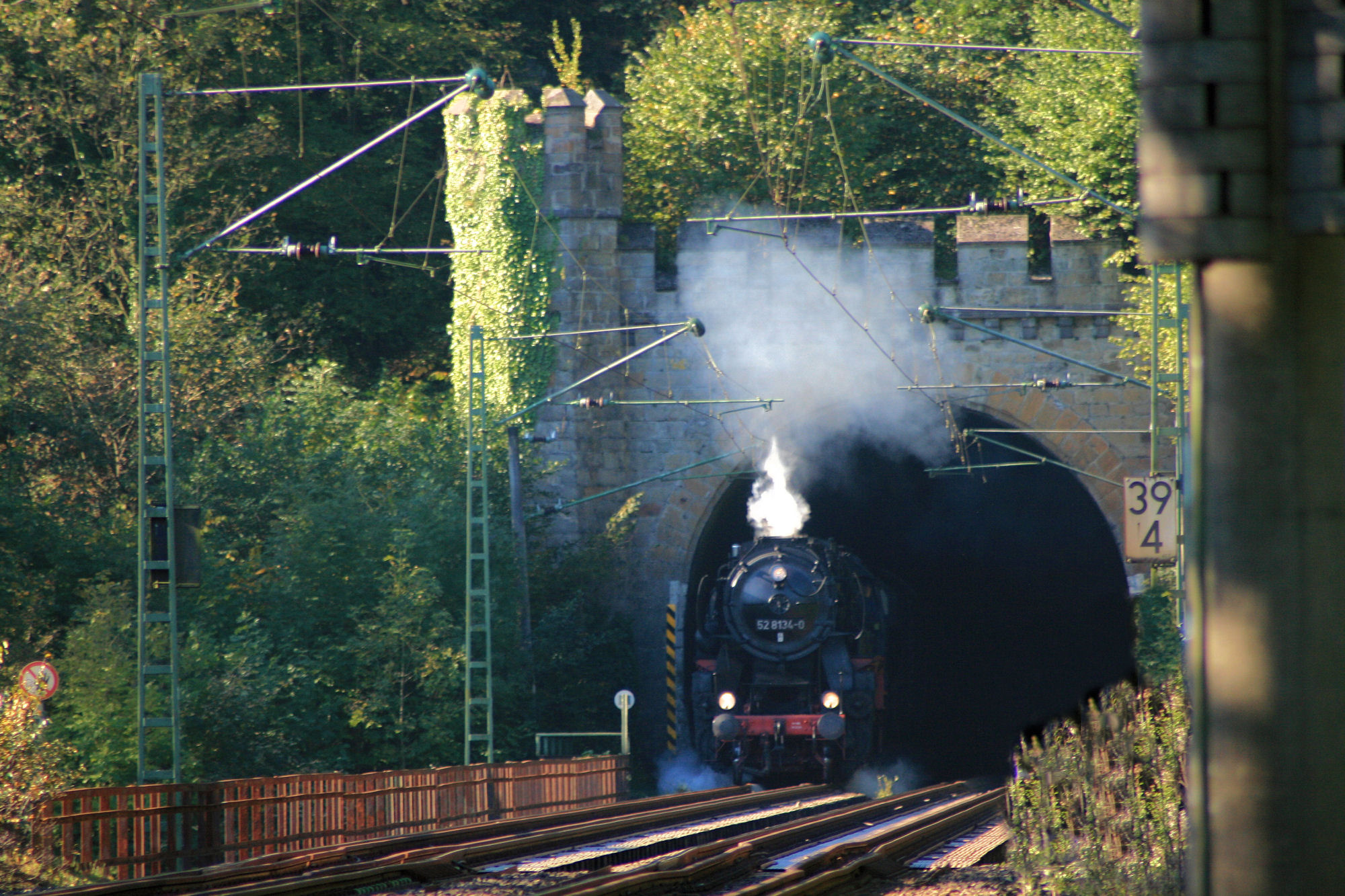 Tunnel Merten